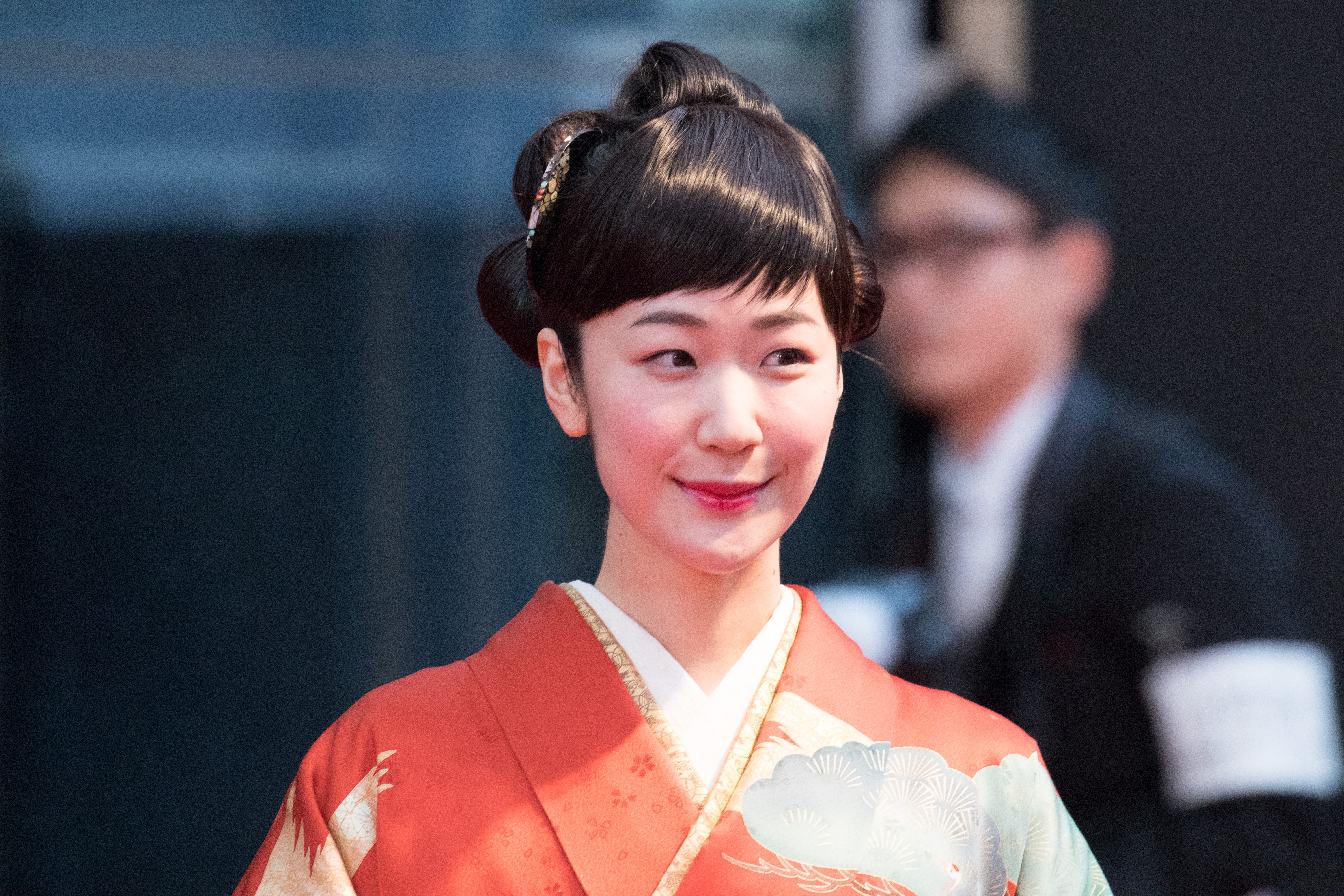 第29回 東京国際映画祭 オープニングセレモニー 黒木華